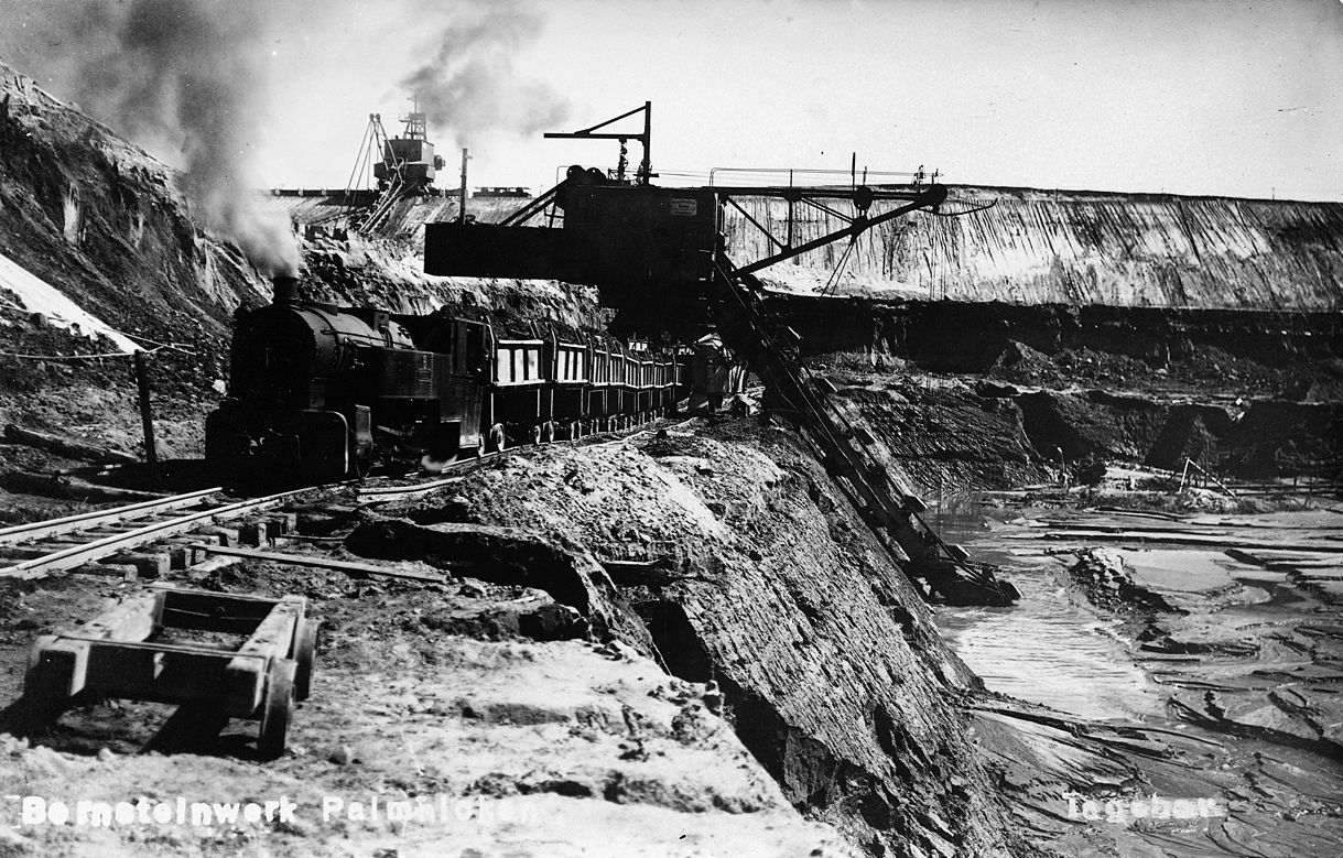 Абзетцер загружает вагоны в карьере Вальтер. Пальмникен (ныне пос. Янтарный). Фото около 1930 года.